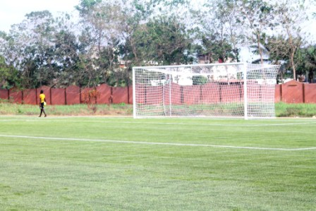 Stade Municipal du centre de formation de Missérété au Bénin